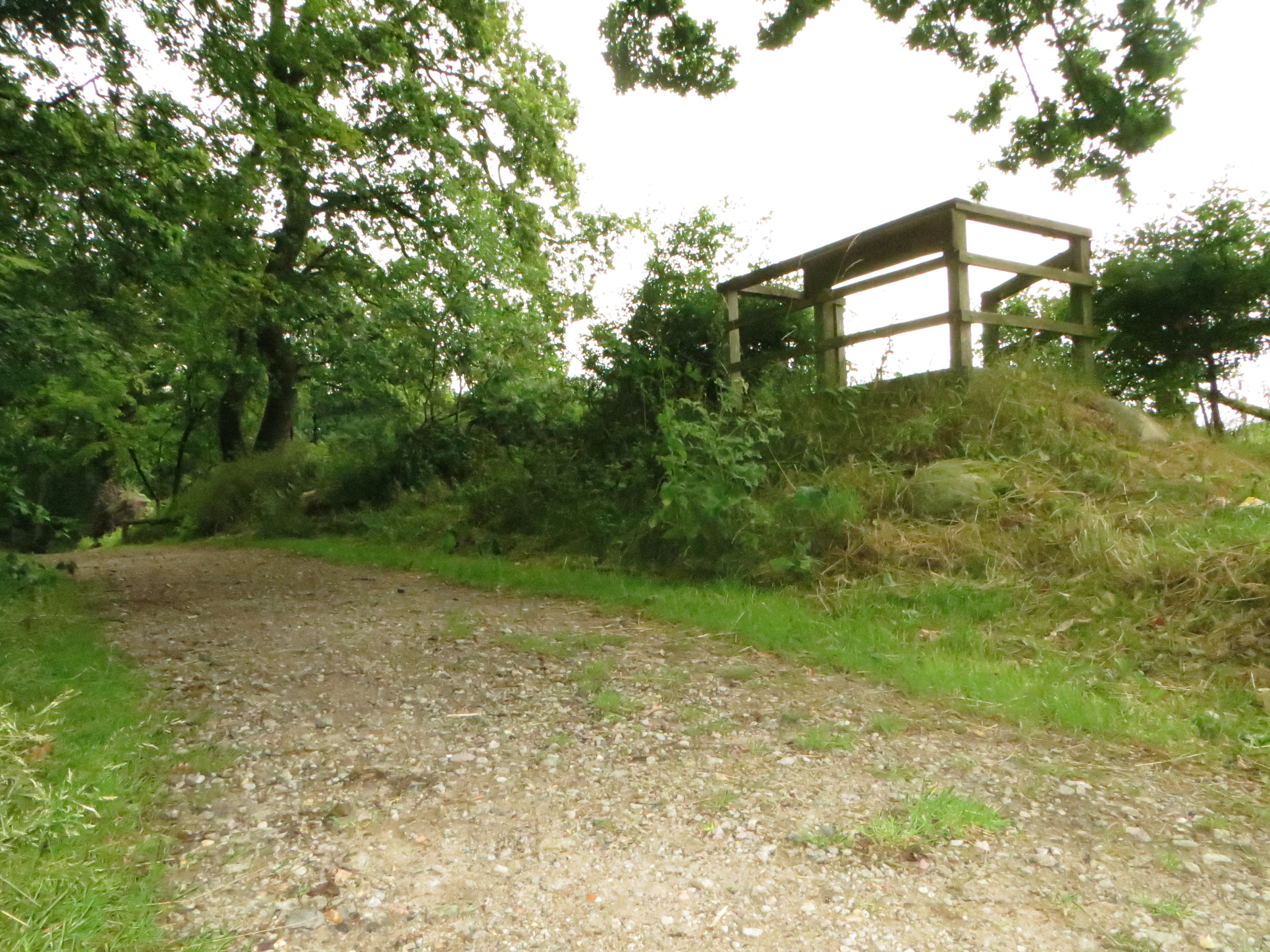 Der Aussichtspunkt Blocksberg (Flensburg), Bild 04